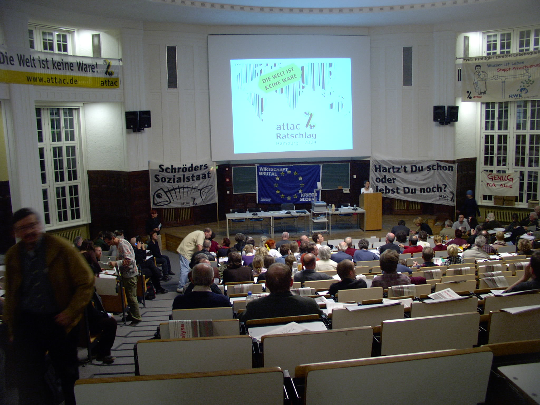 Attac-Versammlung 2004